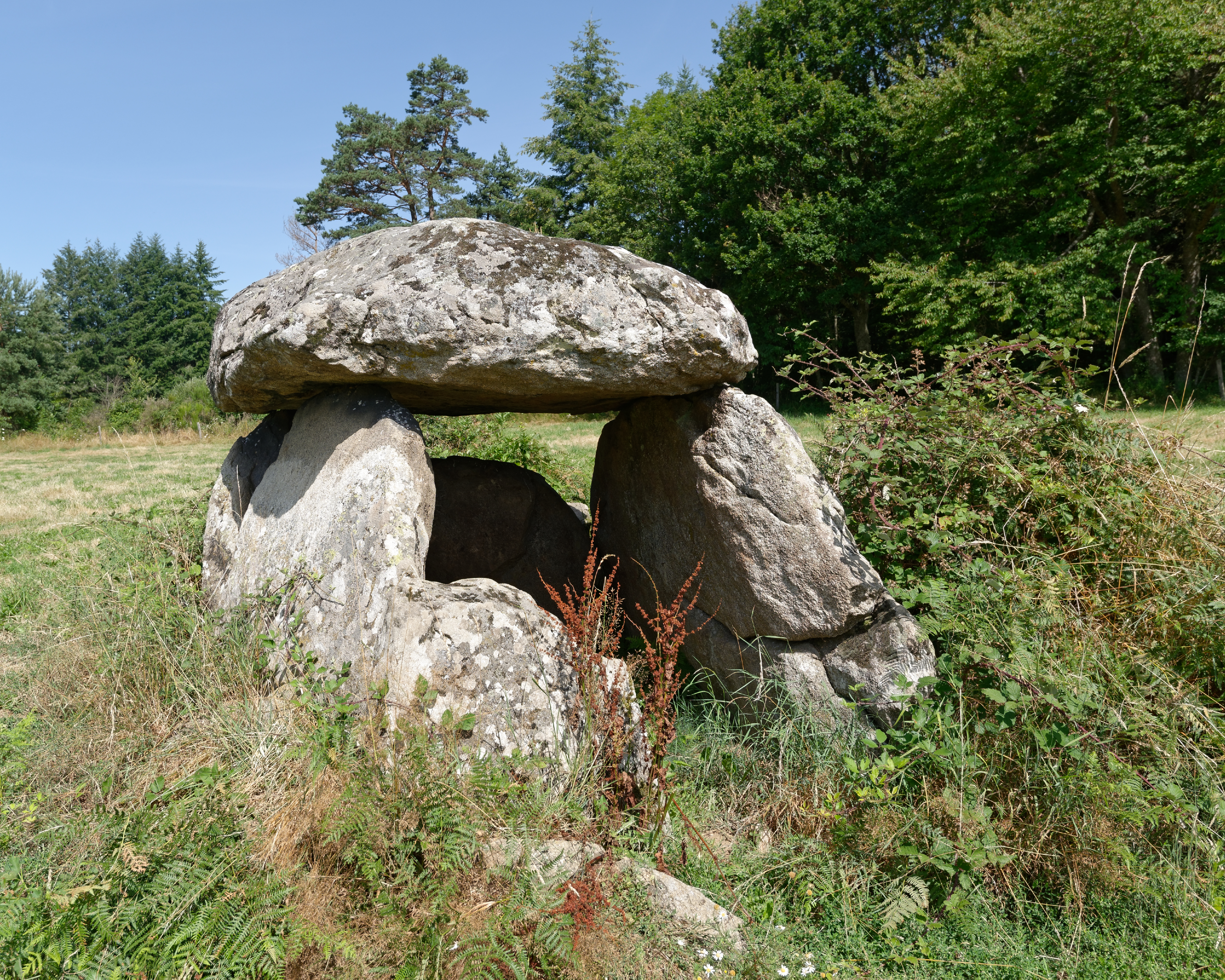 Le dolmen de Boisseyre, dit aussi de la Pierre Couverte, à Ambert (Puy-de-Dôme).